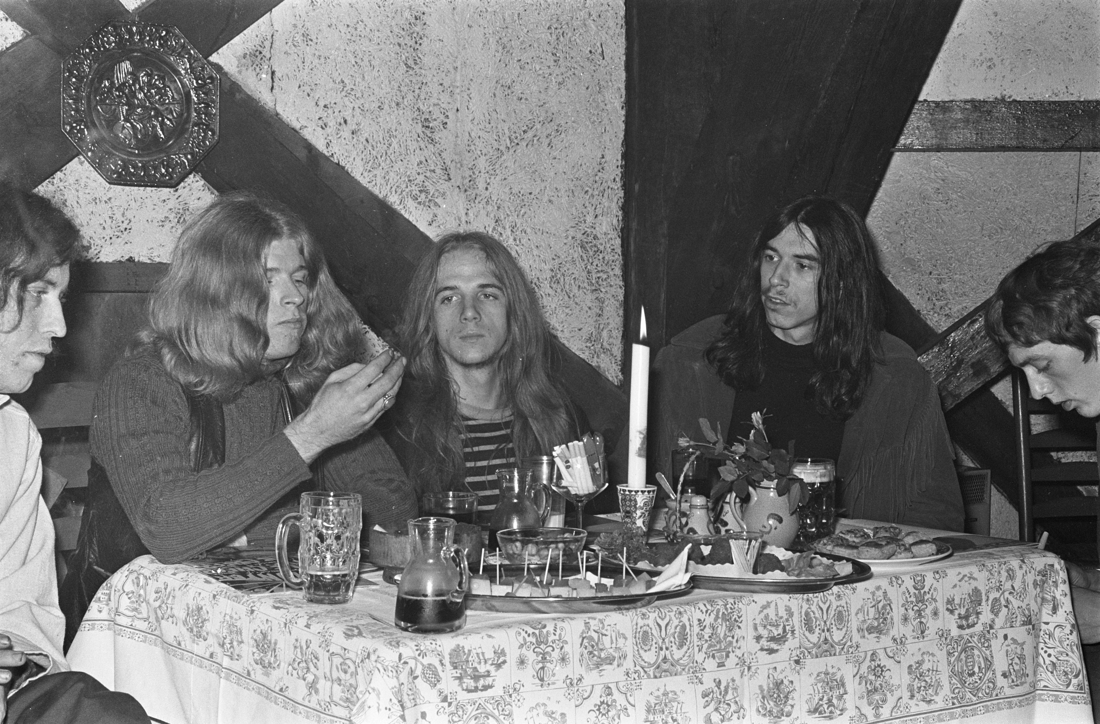 Collectie / Archief : Fotocollectie Anefo Reportage / Serie : [ onbekend ] Beschrijving : Amerikaanse beatgroep Blue Cheer" gaf persconferentie in Amstelveen aan de maaltijd, v.l.n.r. [onbekend], Richard "Dickie" Peterson, Paul Whaley en Randy Holden Datum : 25 oktober 1968 Locatie : Amstelveen, Noord-Holland Trefwoorden : muziek, persconferenties, rockgroepen Persoonsnaam : Holden, Randy, Peterson, Richard, Whaley, Paul Fotograaf : Nijs, Jac. de / Anefo, [onbekend] Auteursrechthebbende : Nationaal Archief Materiaalsoort : Negatief (zwart/wit) Nummer archiefinventaris : bekijk toegang 2.24.01.05 Bestanddeelnummer : 921-7939